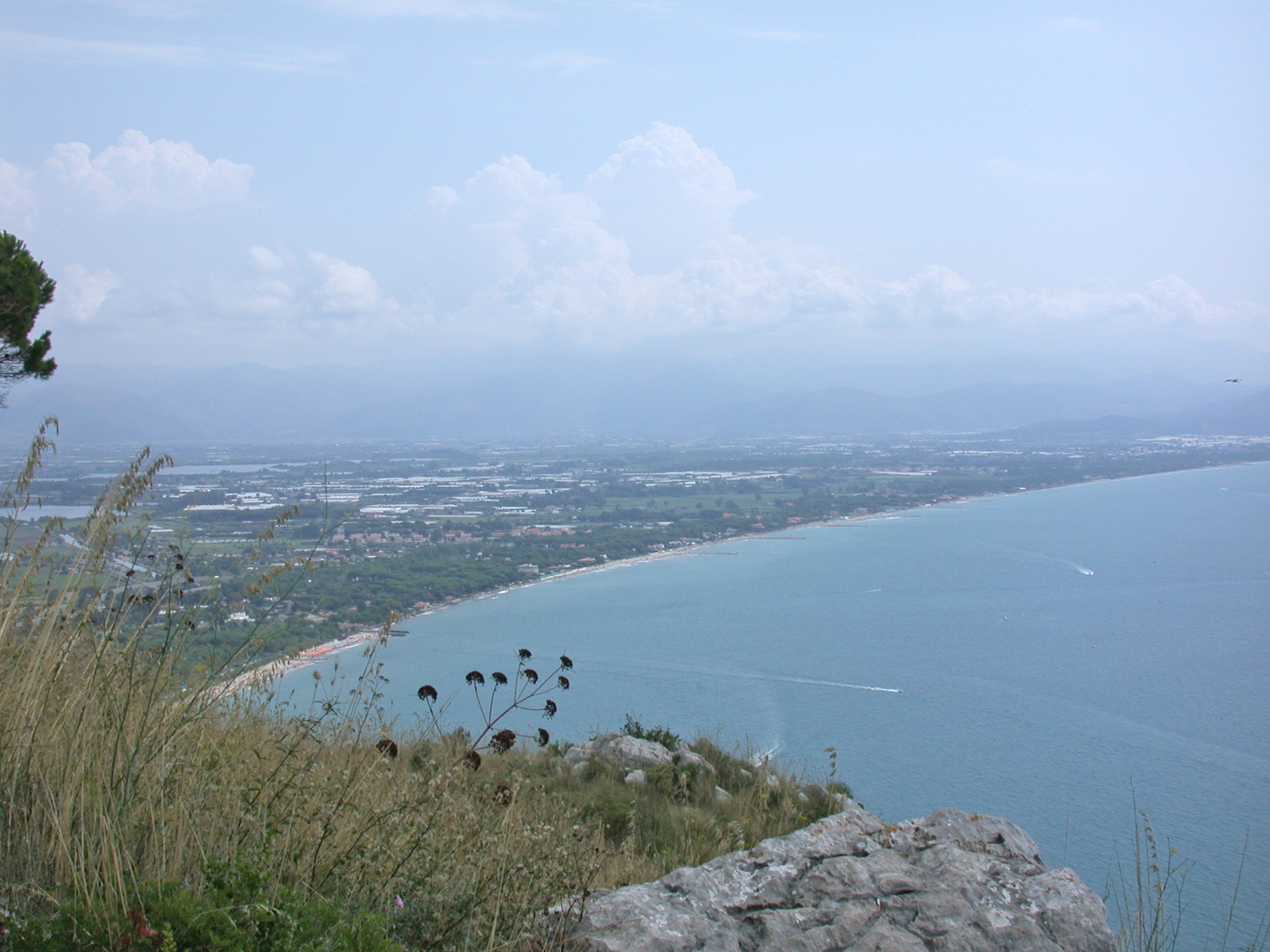 Piana tra Terracina e Fondi (provincia di Latina, Lazio, Italia), dal monte Sant'Angelo (santuario di Giove Anxur) sopra Terracina.